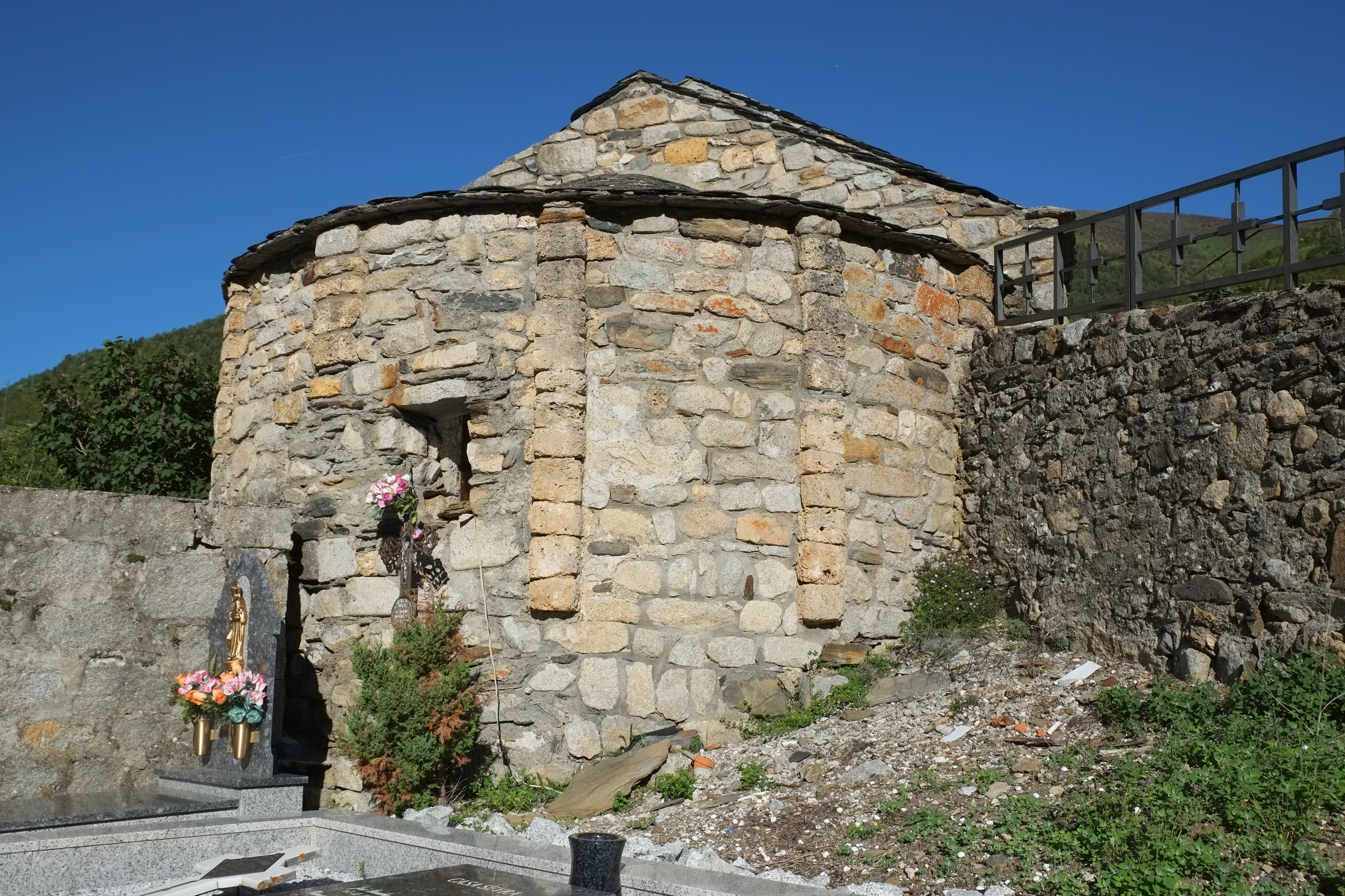 Kirche in Aneto, einem Ortsteil von Montanuy in der Provinz Huesca in Aragonien (Spanien)